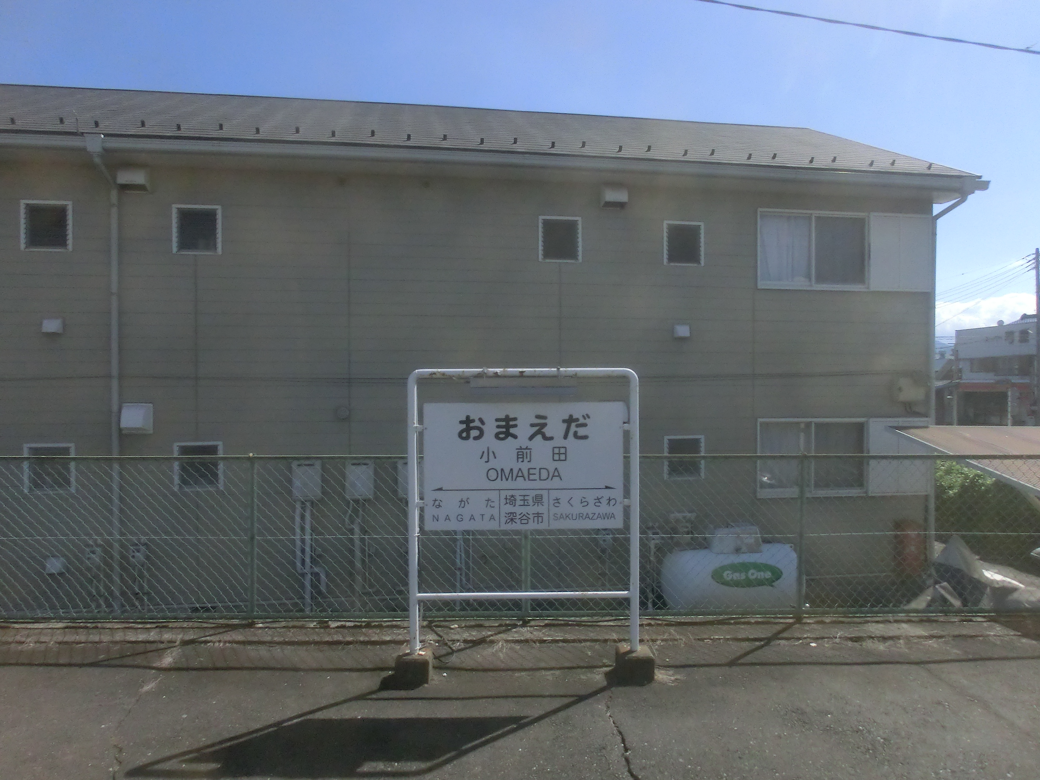 秩父鉄道秩父本線 小前田駅の駅名票